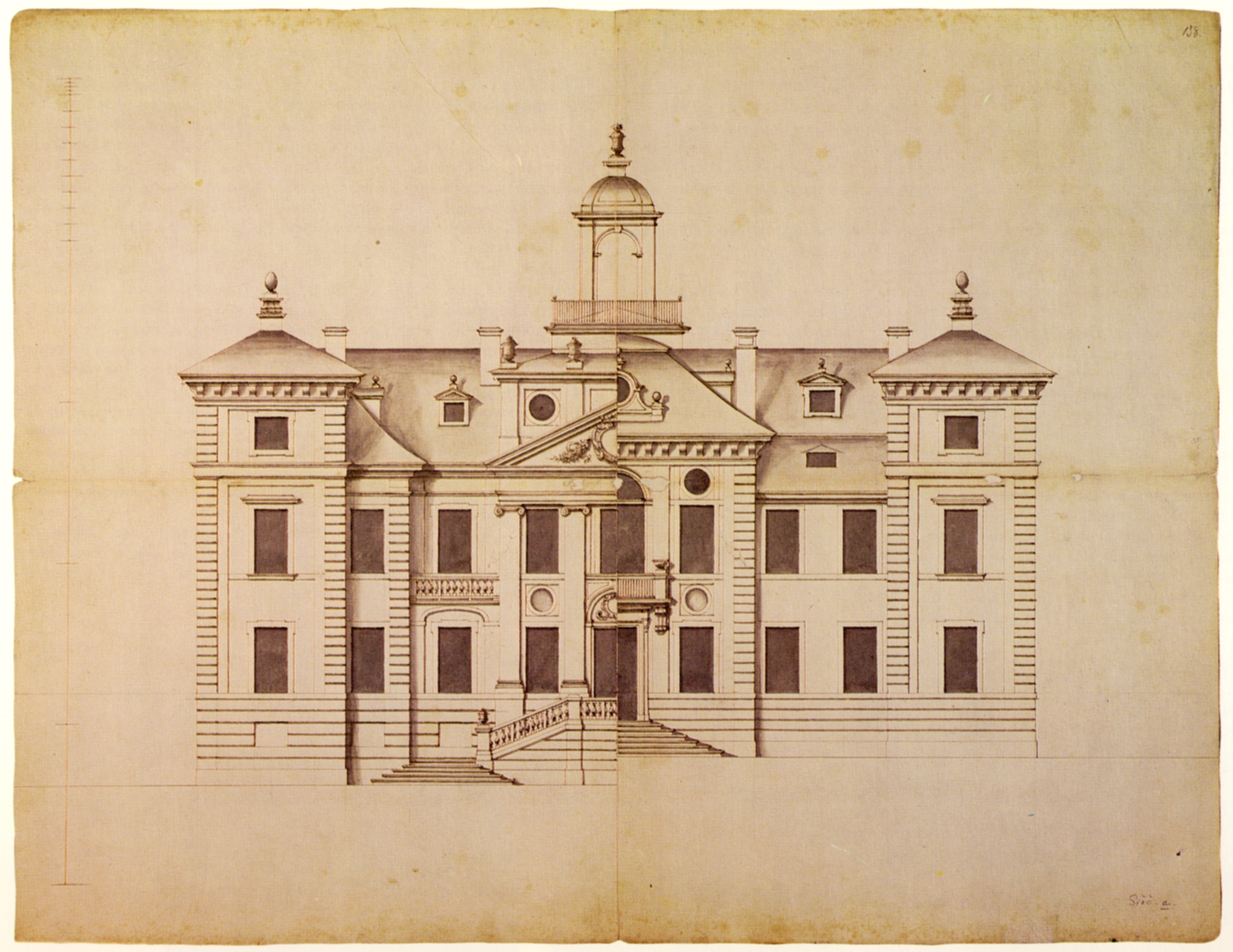 Fasadritning till Sjöö slott